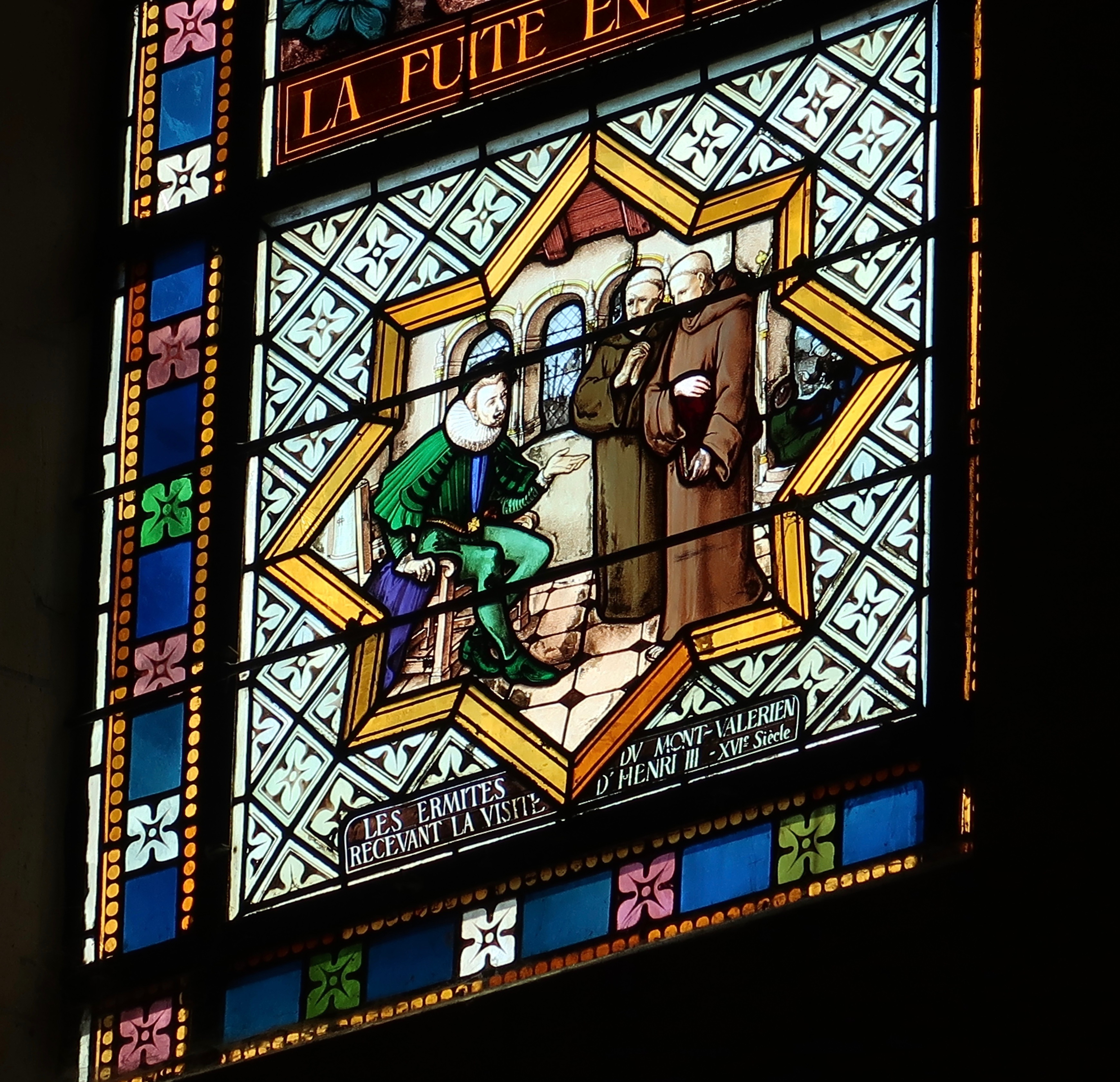 Détail d'un vitrail de l'église Cœur-Immaculé-de-Marie de Suresnes (Hauts-de-Seine) : « Les ermites du mont Valérien recevant la visite d'Henri III - XVIe siècle ».